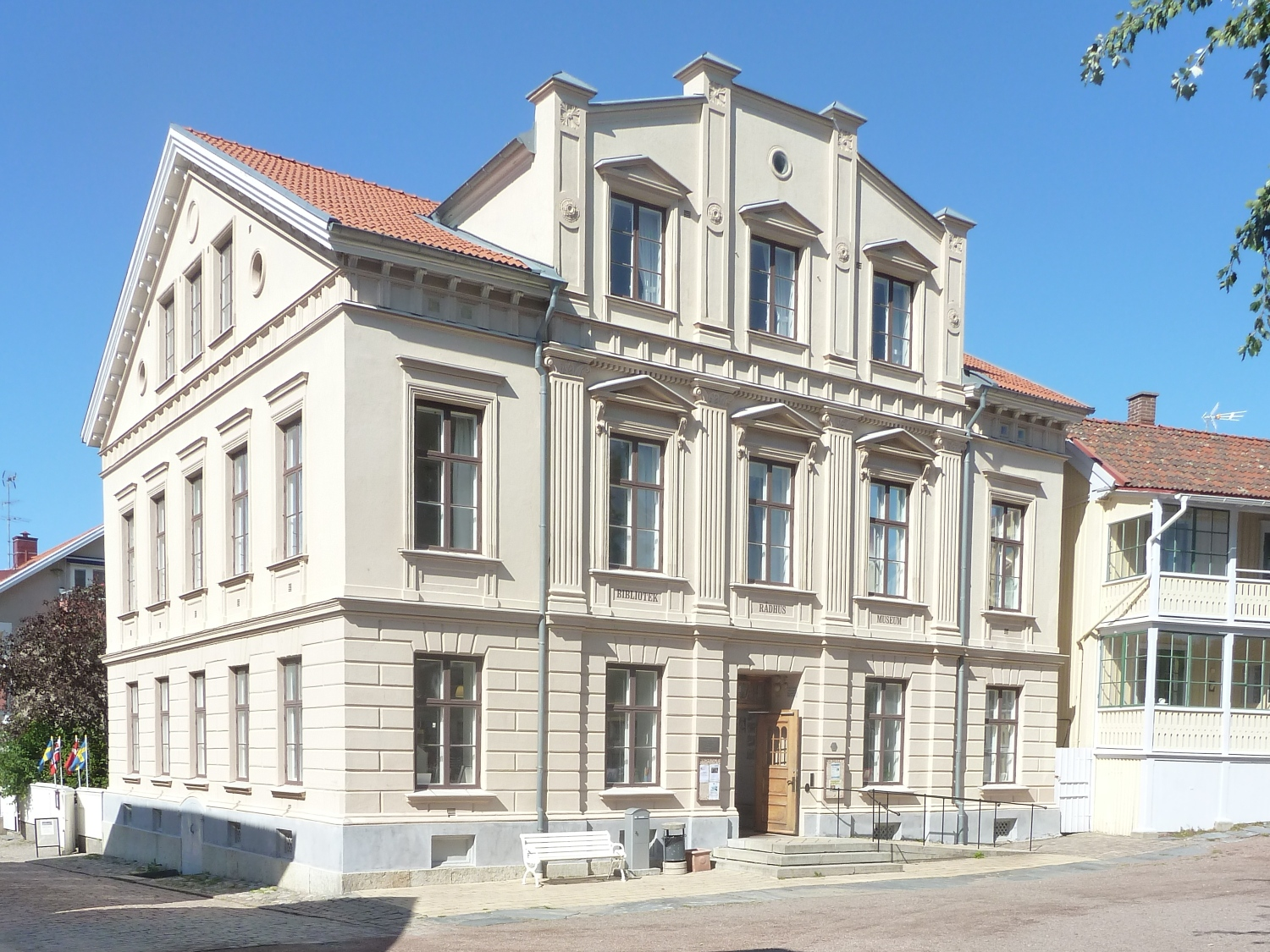 Rathaus in Marstrand